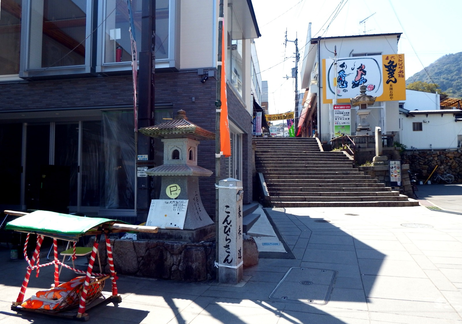 金刀比羅宮の参道の一段目